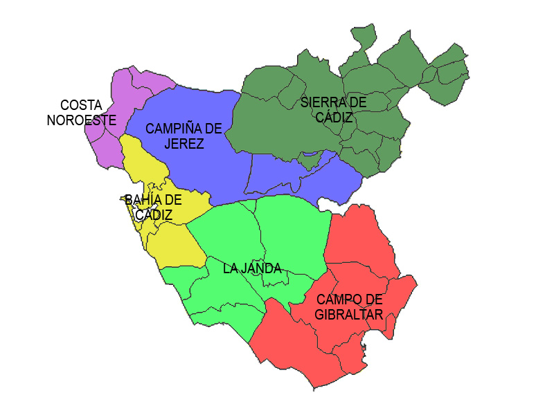 Mapa de las comarcas de la provincia de Cádiz; Map of Cádiz's Comarques